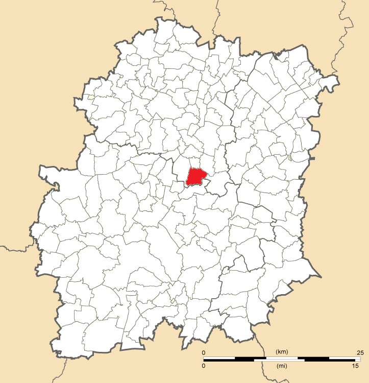 Carte de position de Cheptainville en Essonne (91)